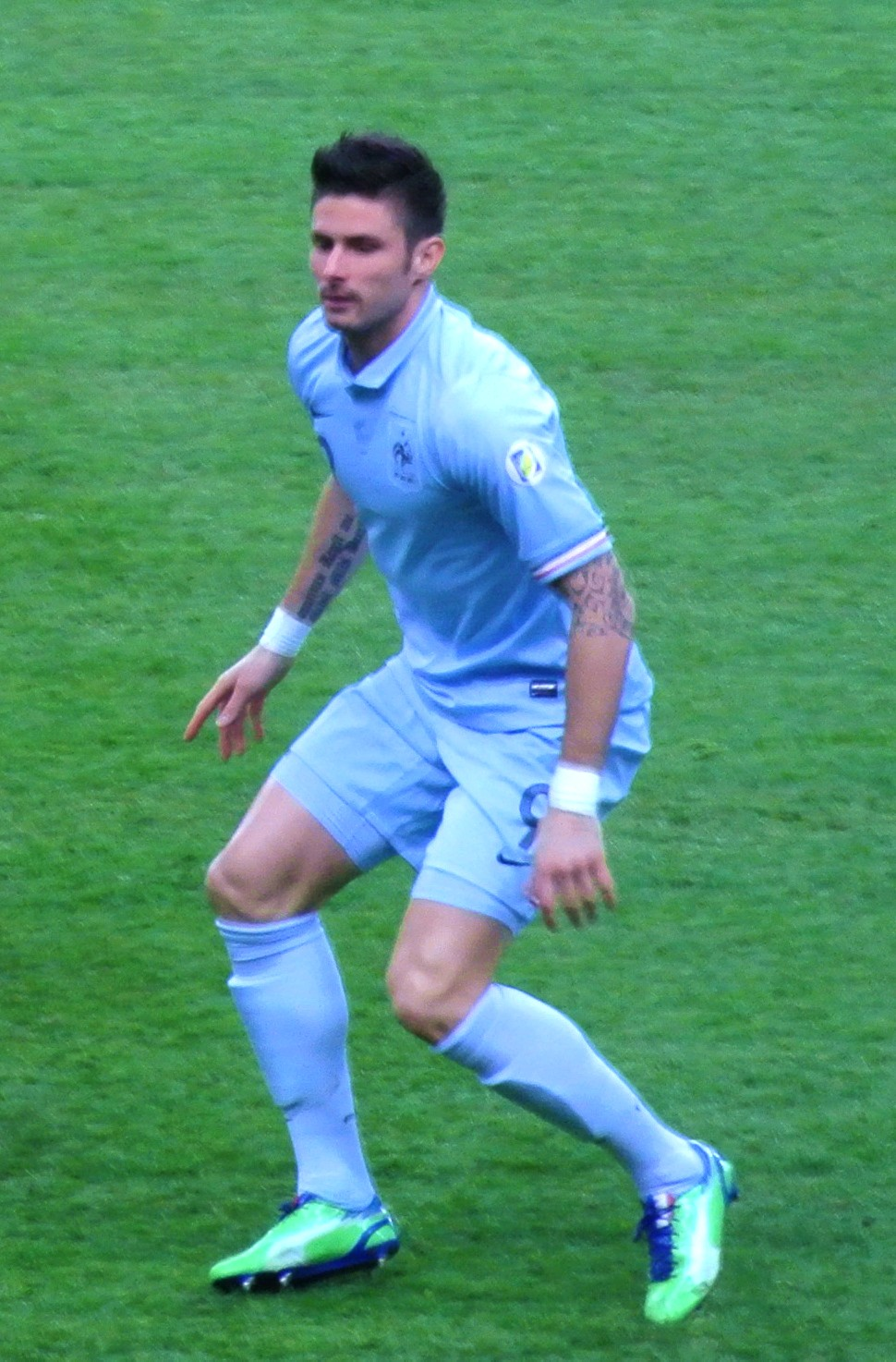 Giroud en équipe de France, le 22 mars 2013